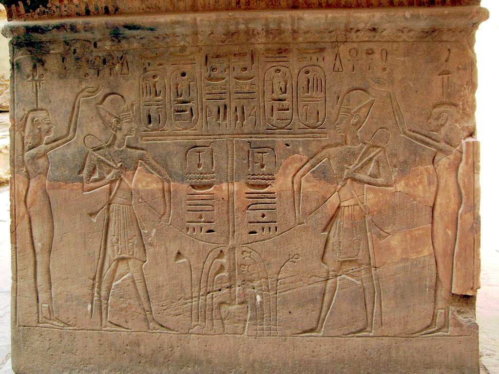 Relief du reposoir de la barque du dieu Khonsou dans son temple de Karnak - Ramsès III faisnat l'acte rituel du séma-Taouy - XXe dynastie égyptienne.